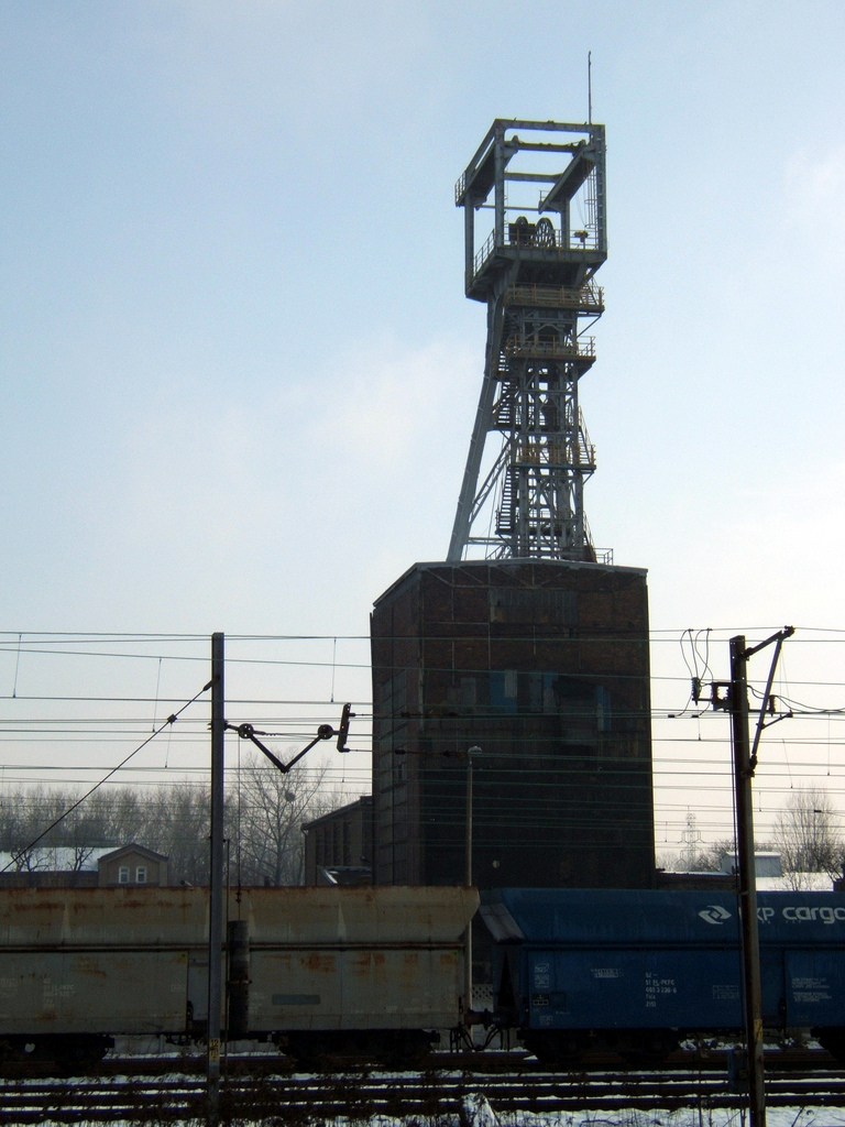 Kolejowy I shaft in Chorzów, former Chorzów coal mine